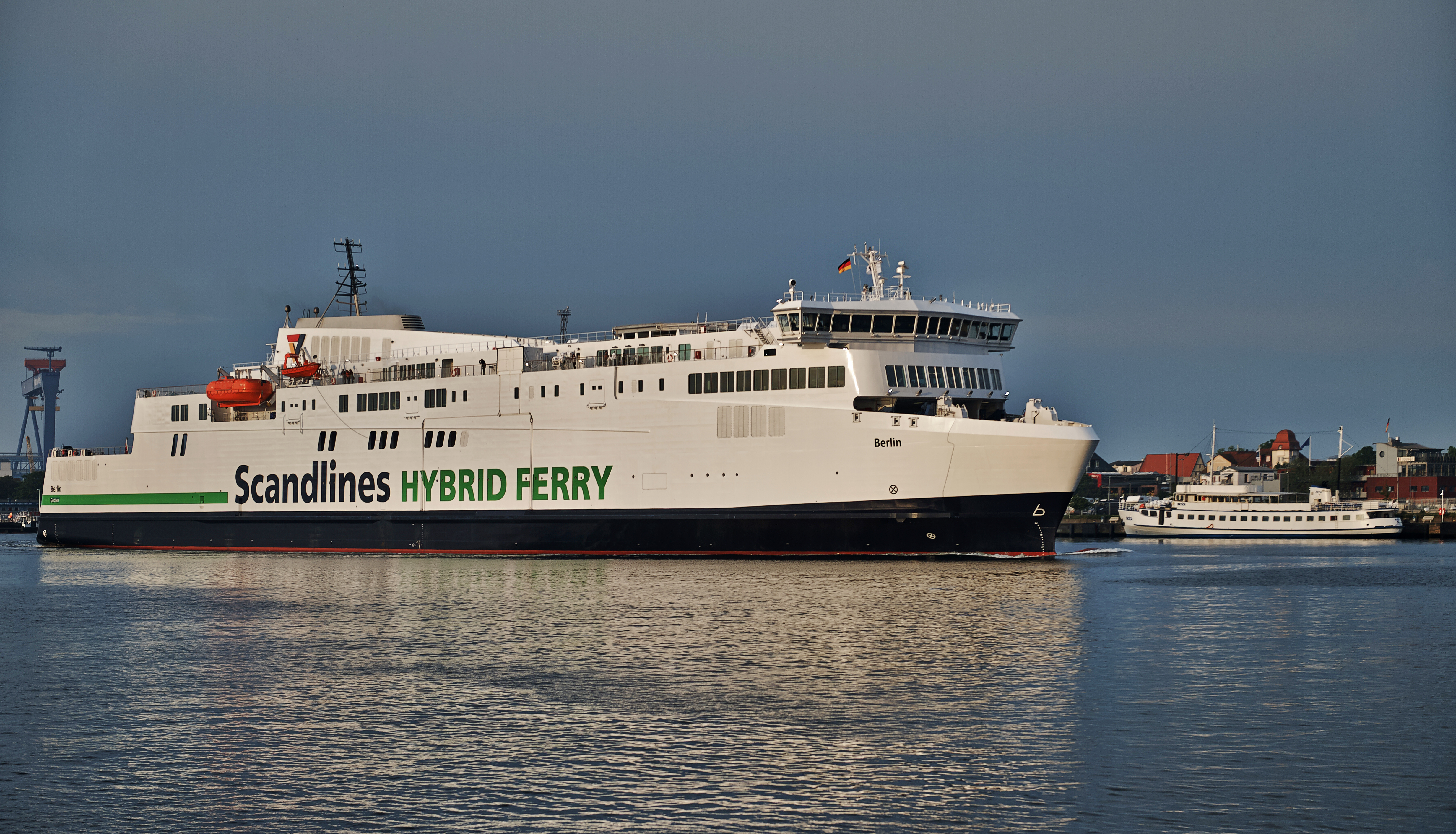 Scandlines-Fährschiff Berlin in Rostock